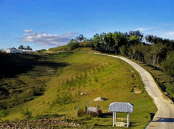 Alcoy, Cebu, Philippines